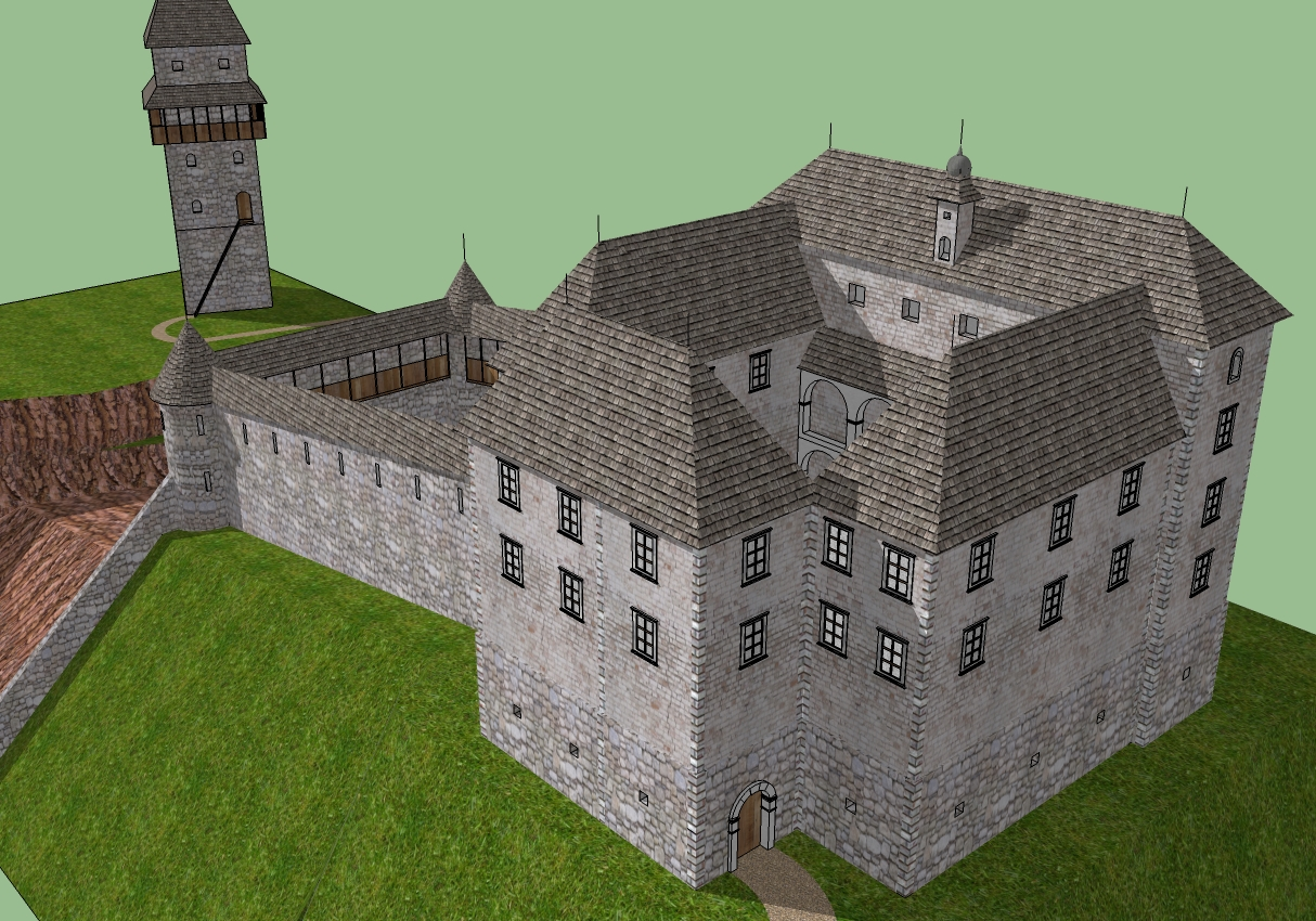 Poskus rekonstrukcije gradu Krško s programom SketchUp. Avtor: Rok Kranjc (Freienthurn). Delano po skicni osnovi dr. Igorja Sapača.